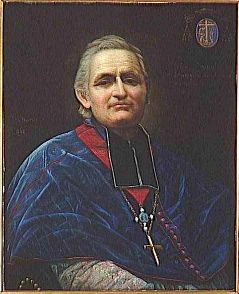 Portrait de Monseigneur Dupanloup Félix (1802-1878), évêque d'Orléans